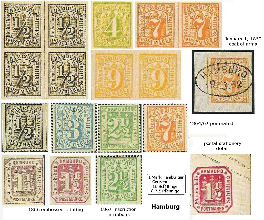 Postwertzeichen der hamburger Stadtpost gescannt W.Steven 15:55, 10. Jan. 2007 (CET) 2007 English legend by Tirkfl.